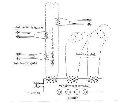 A telefonhírmondó elvi kapcsolási vázlata.